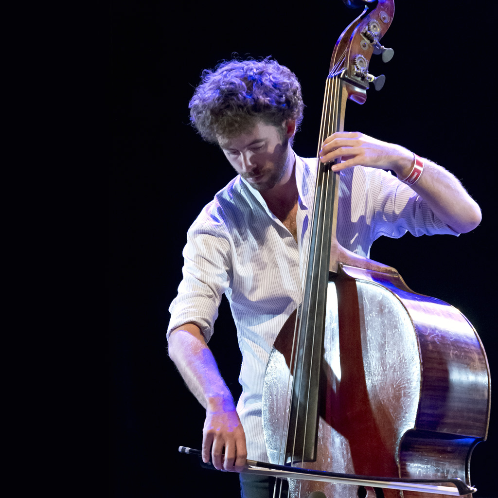 Portrait de Simon Tailleu, accompagnant Youn Sun Nah en compagnie de Ulf Wakenius et Vincent Peirani, le 22 octobre 2014 sur la scène du Théâtre Lino Ventura à Nice (New Jazz Festival 2014)